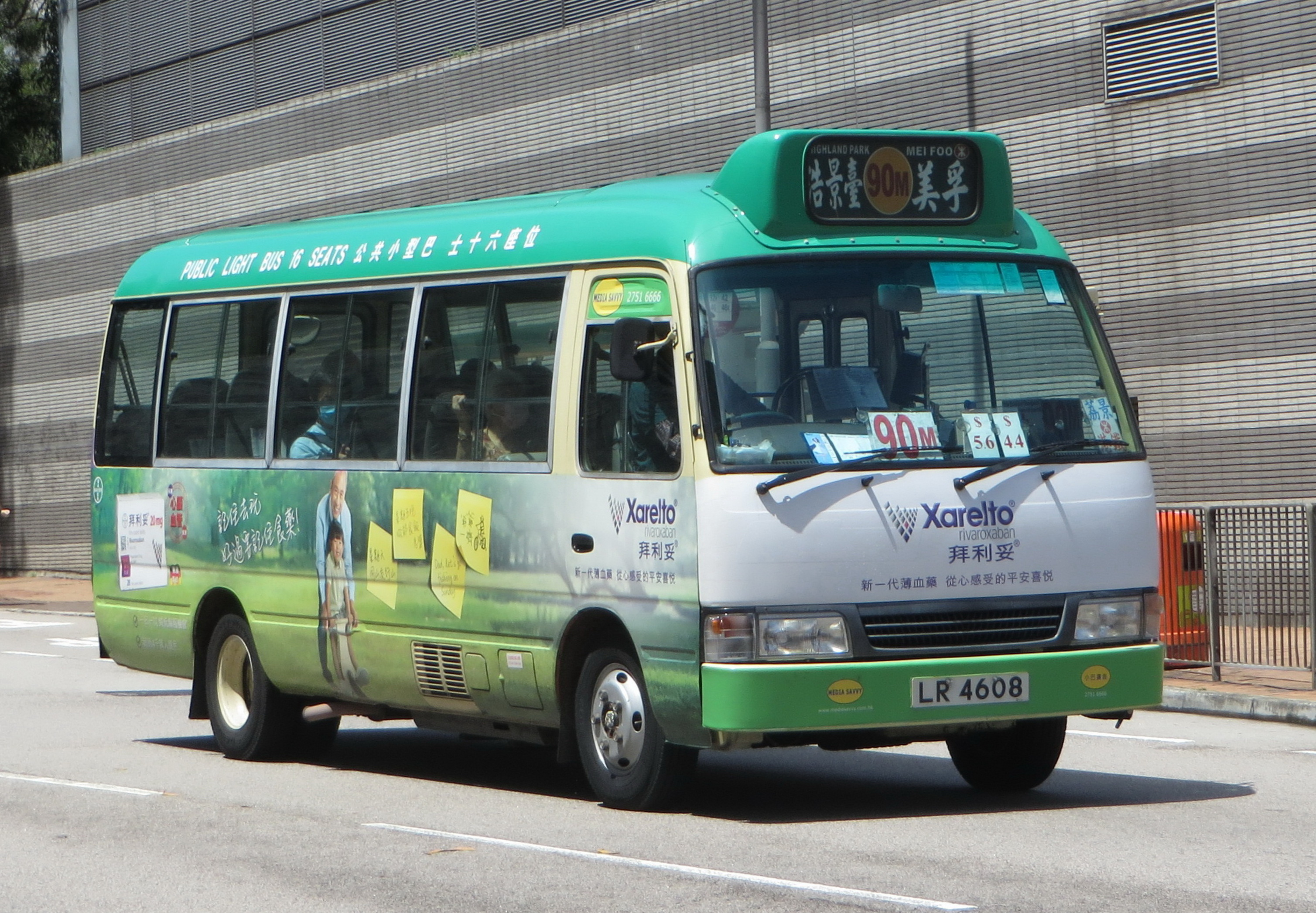 中文（中国大陆）: 小巴LR4608的照片